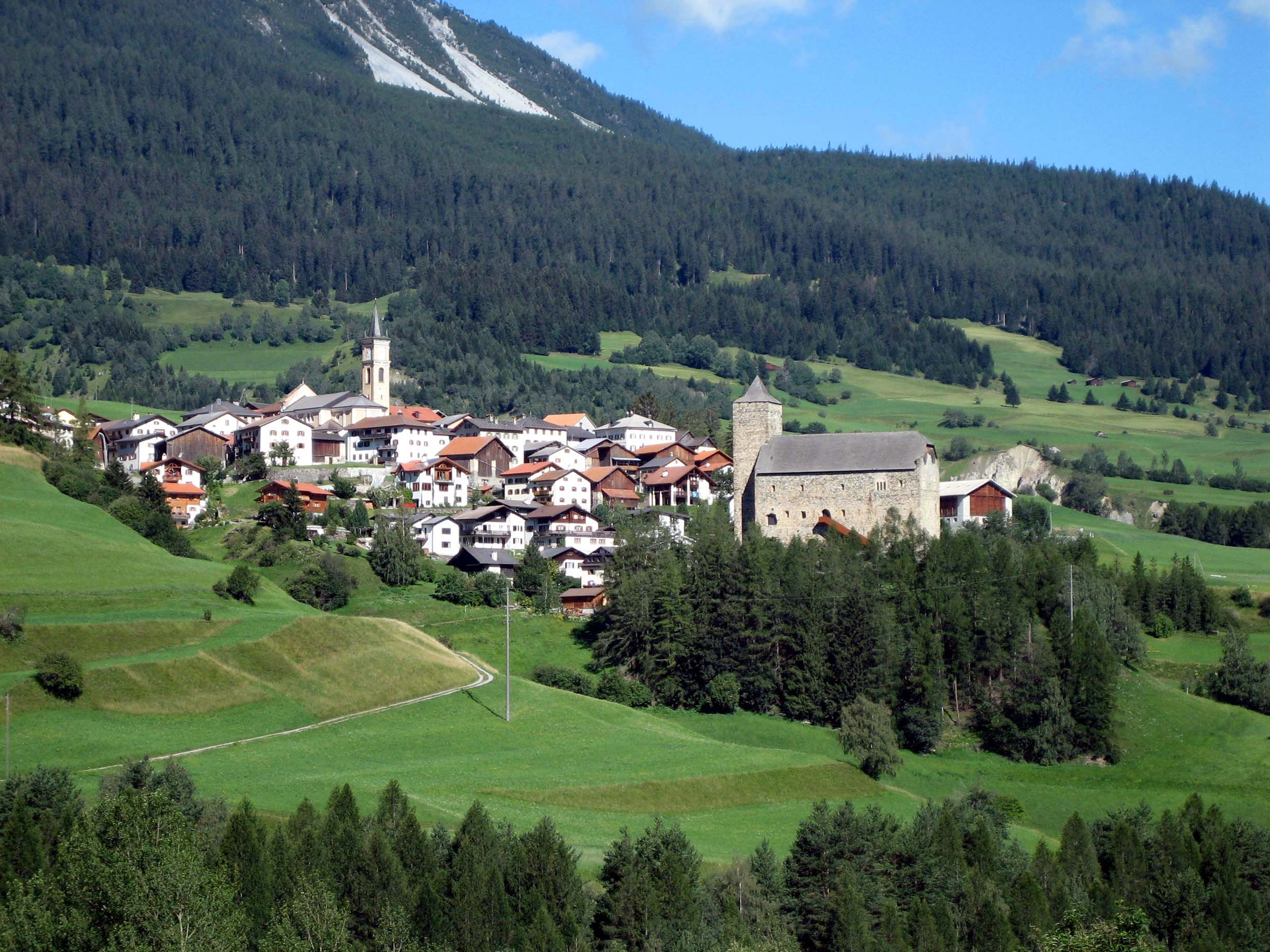 Riom